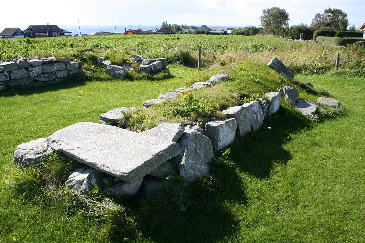 Randabergkirken (Viste kirkeruin, Kirkebakken).